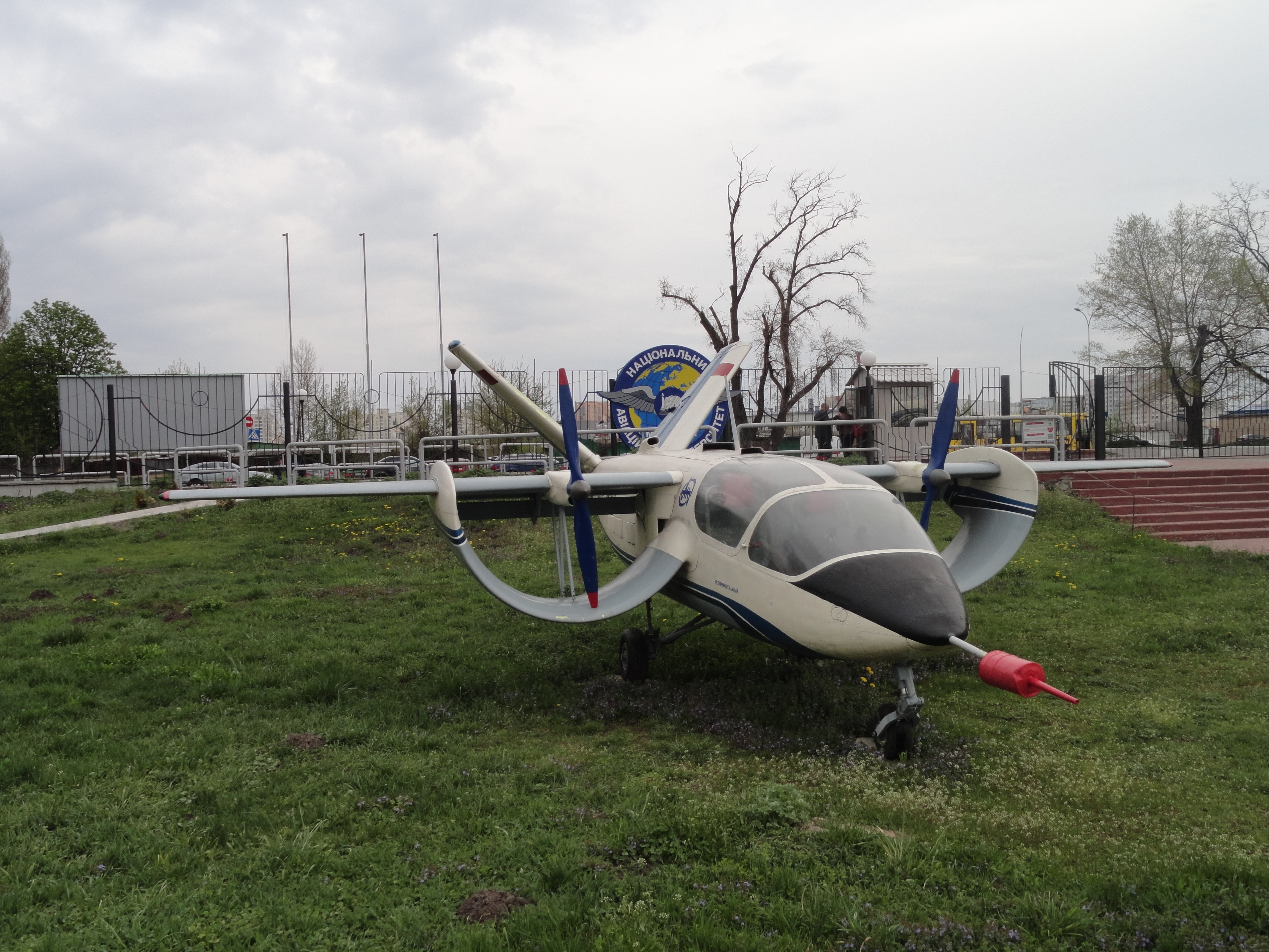 Самолёт Изделие181 в Киевском музее авиации